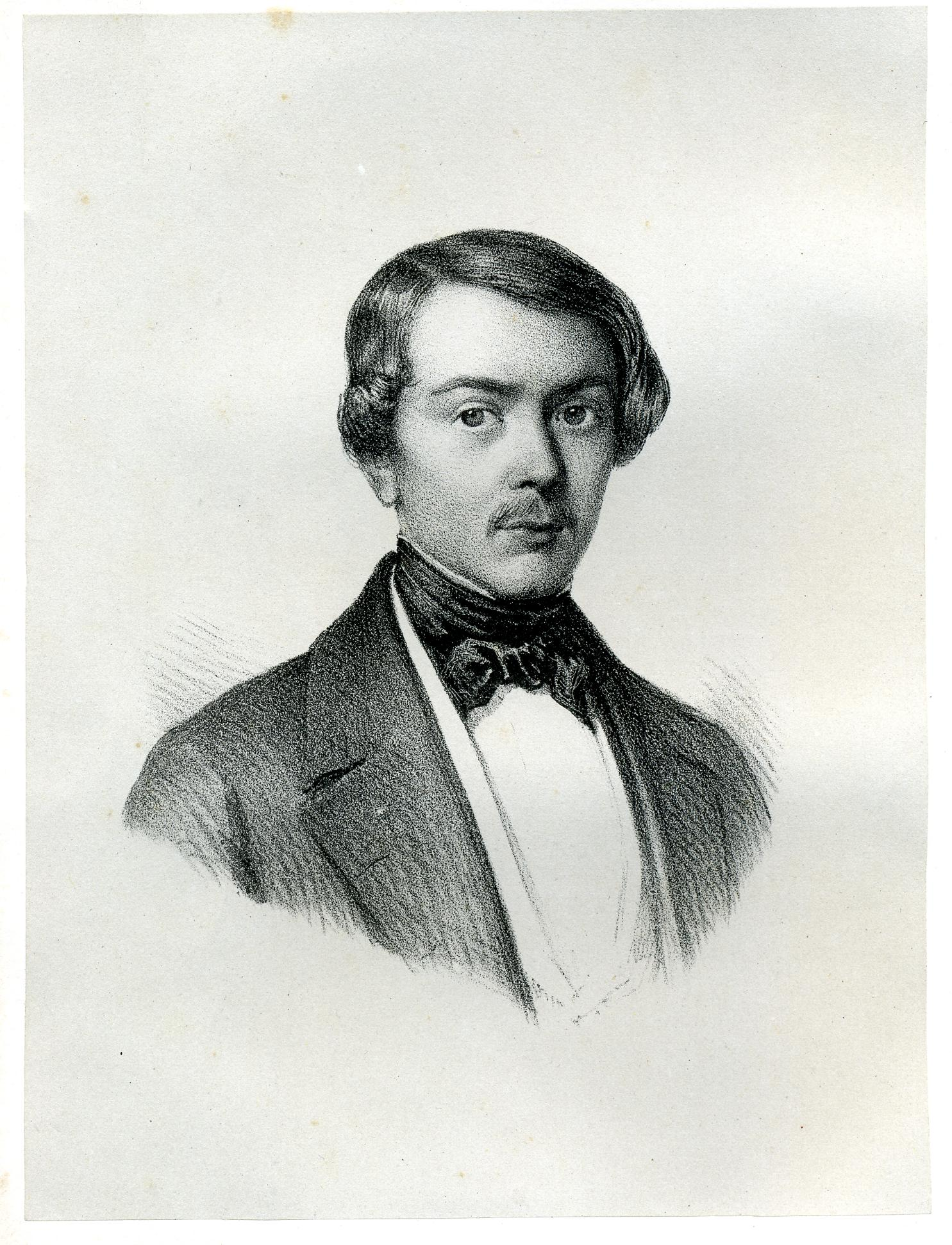 Portrait de l'architecte Louis van Overstraeten